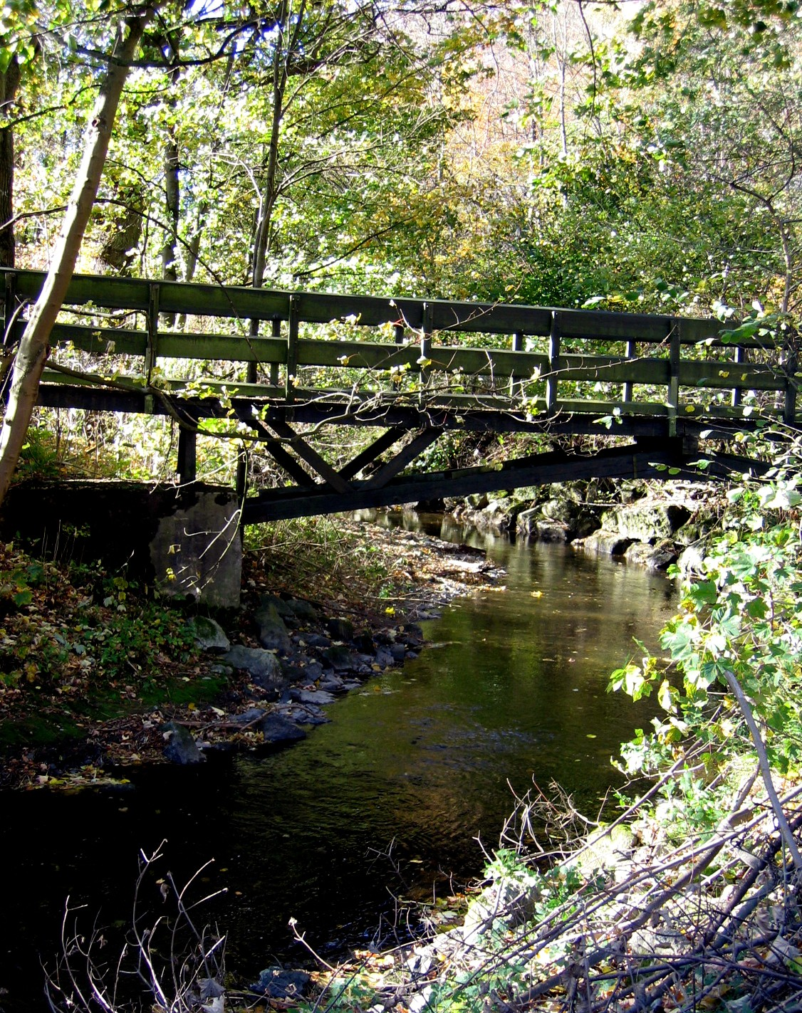 Description: Die Hönne zwischen Balve und Menden (Sauerland) Source: selbst fotografiert Date: 31. Okt. 2005 Author: Asio otus